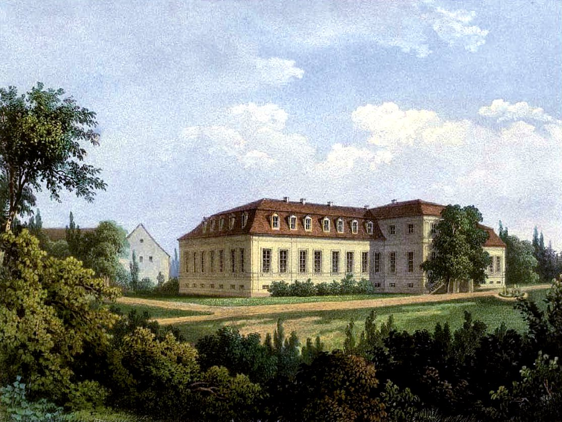 Schloss Sanditten, Kreis Wehlau